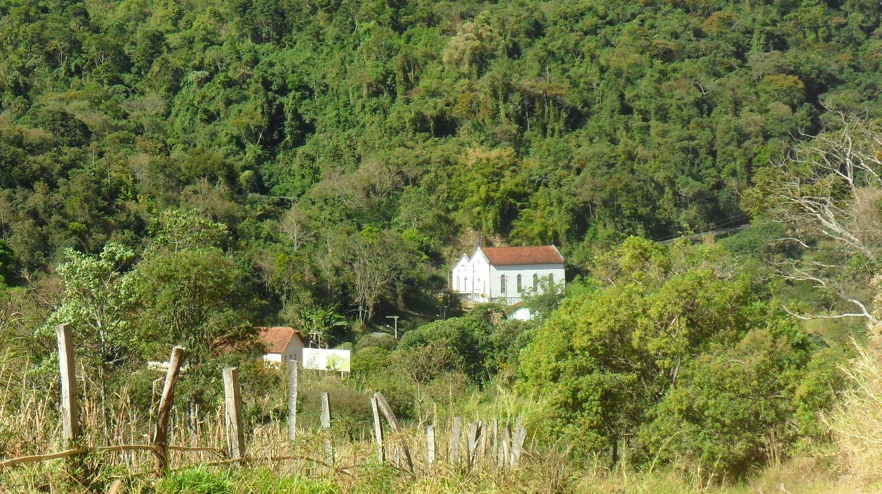 Pequena Central Hidrelétrica Luís Dias localizada no Rio Lourenço Velho, em Itajubá, Minas Gerais, Brasil